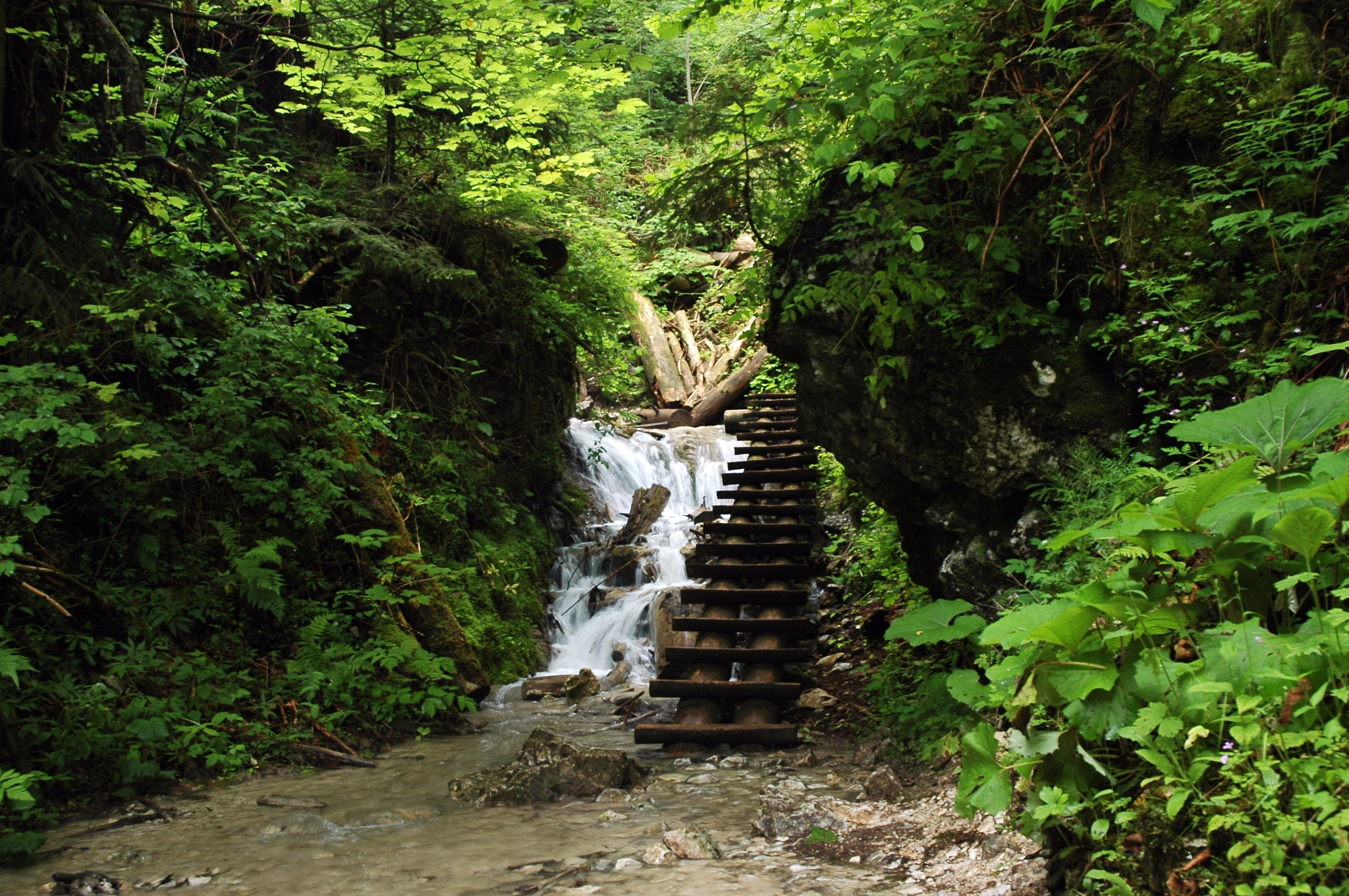 Slovak paradise (Slovenský raj), Slovakia